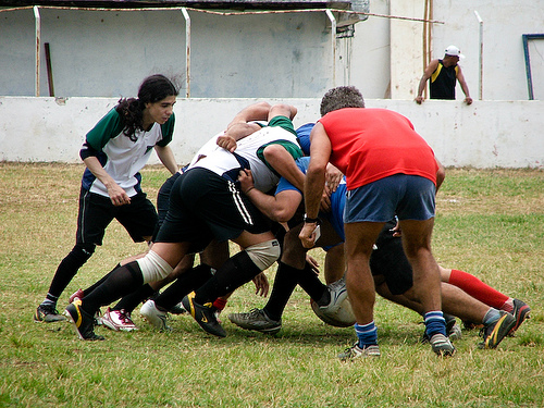 Jogo Rugby Sevens Masculino